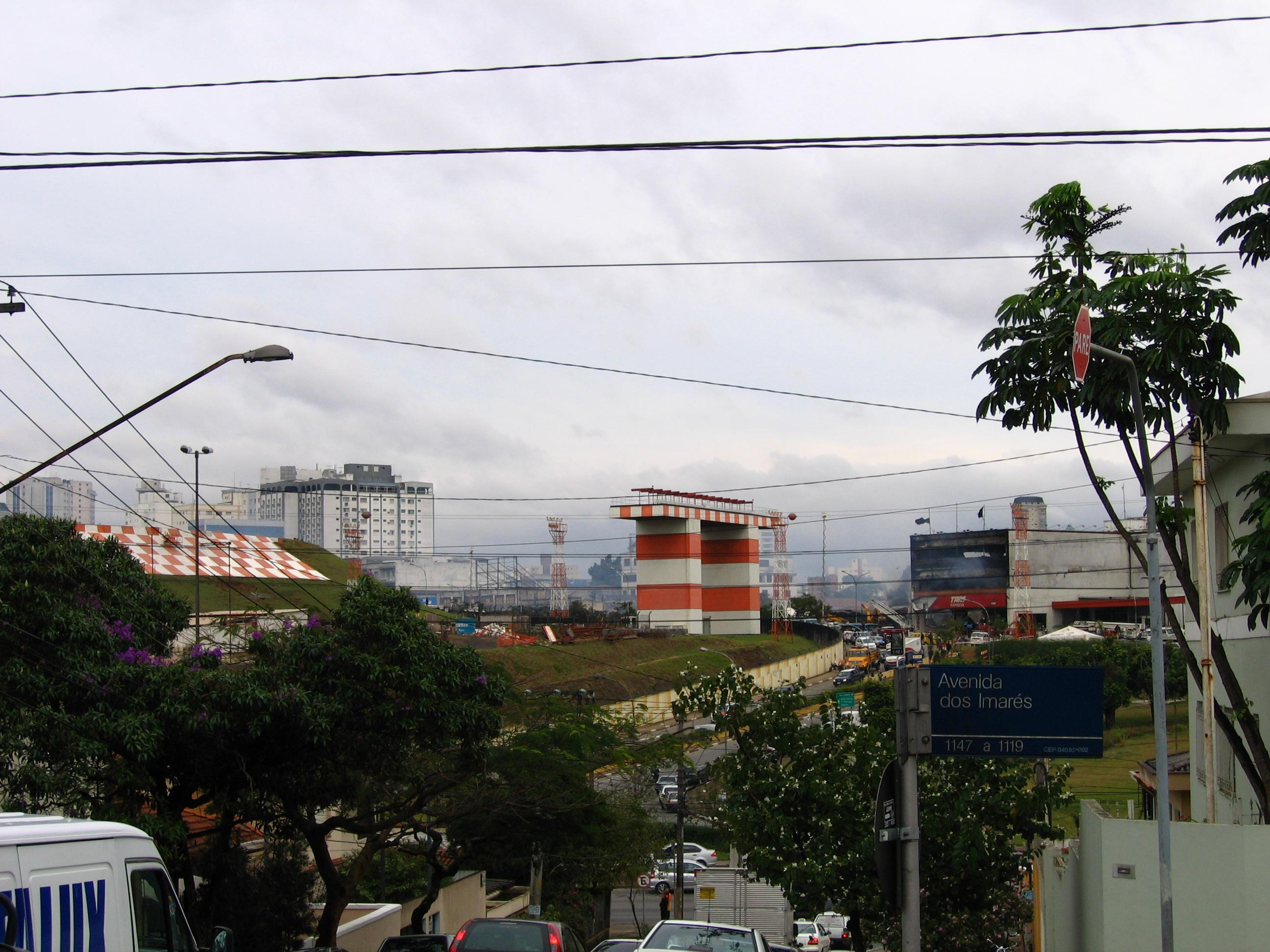 Vista geral do local do acidente.